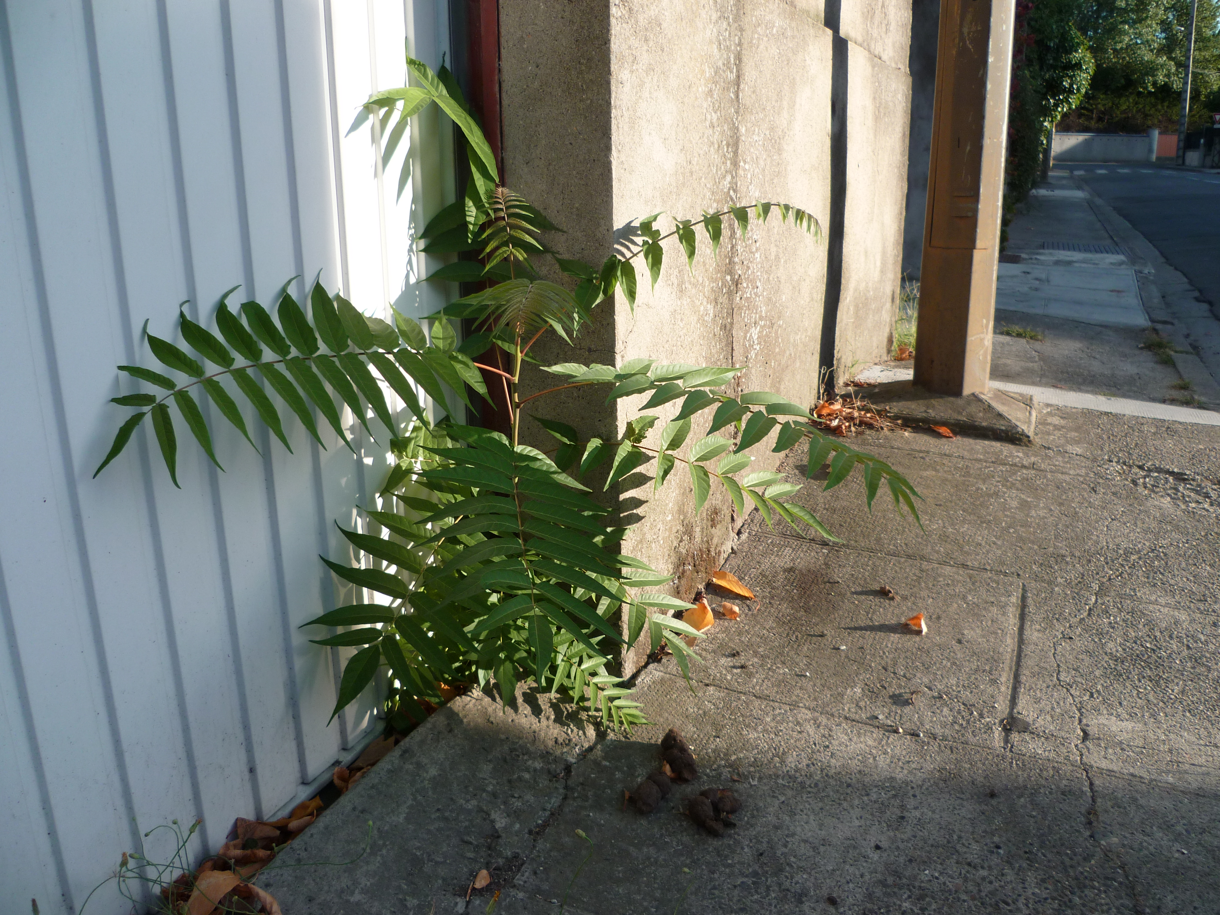 Toulouse (Haute-Garonne, France) : Ailante (Ailanthus altissima) poussant devant la porte d'un garage.